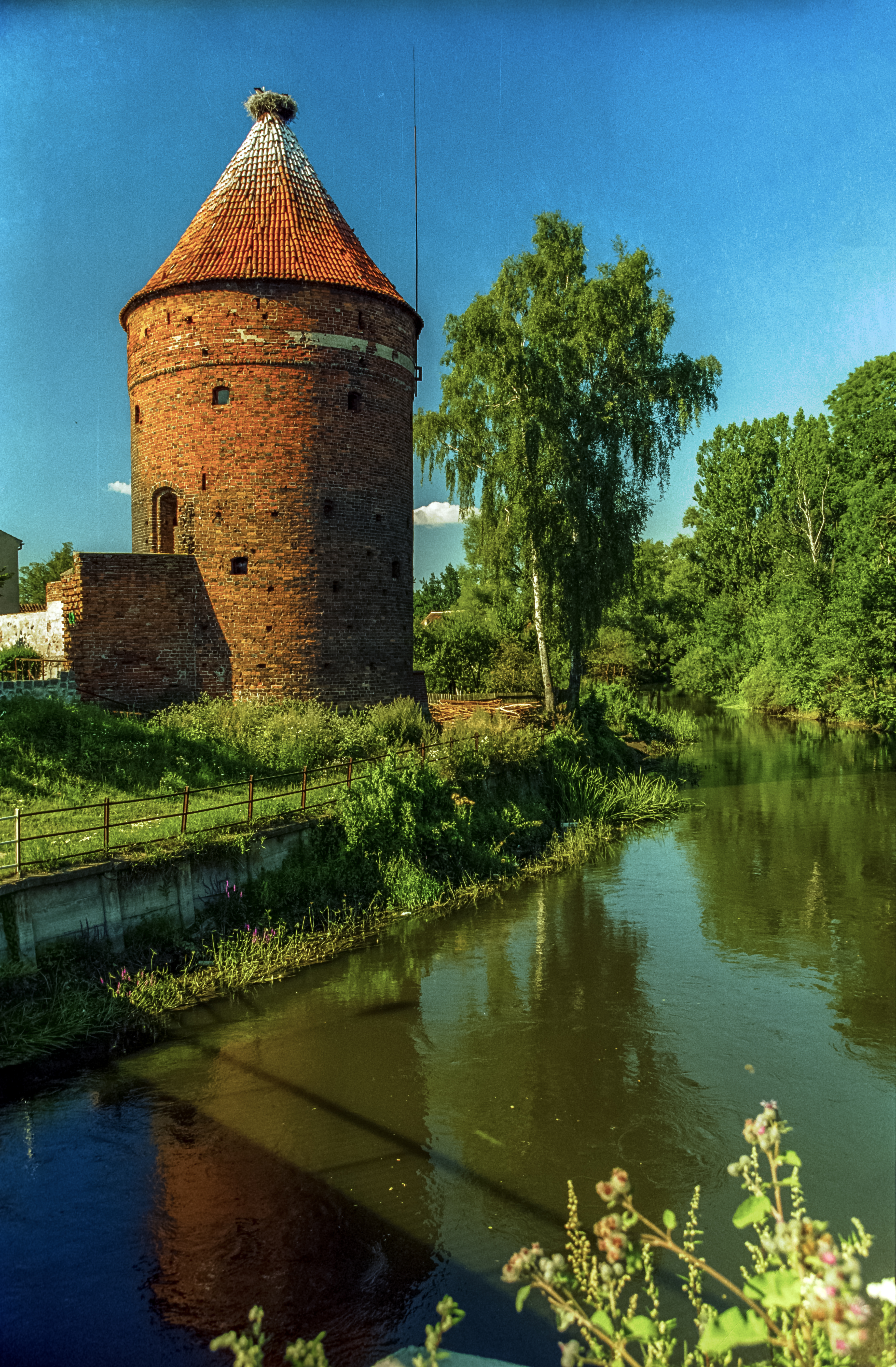 Dobre Miasto, ul. Sowińskiego - Baszta Bociania, XIV-XV